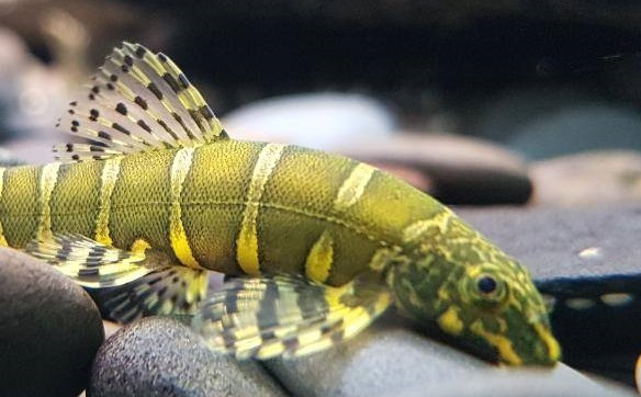 Adult from an aquarium.